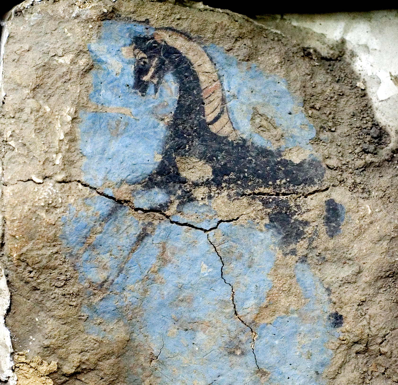 Old Urartian Fresco in Erebuni Museum, Armenia.